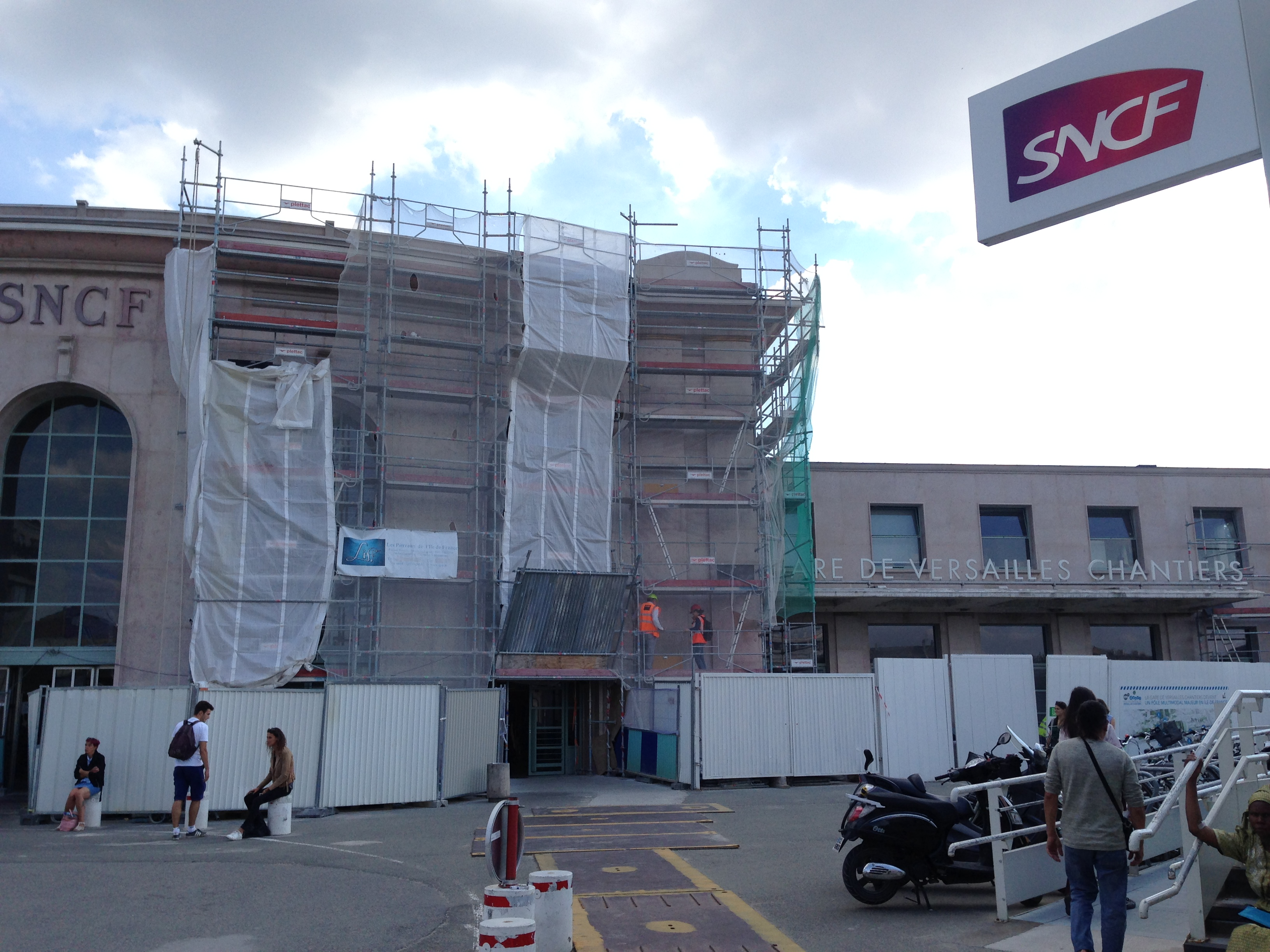 Gare de Versailles-Chantiers-2016